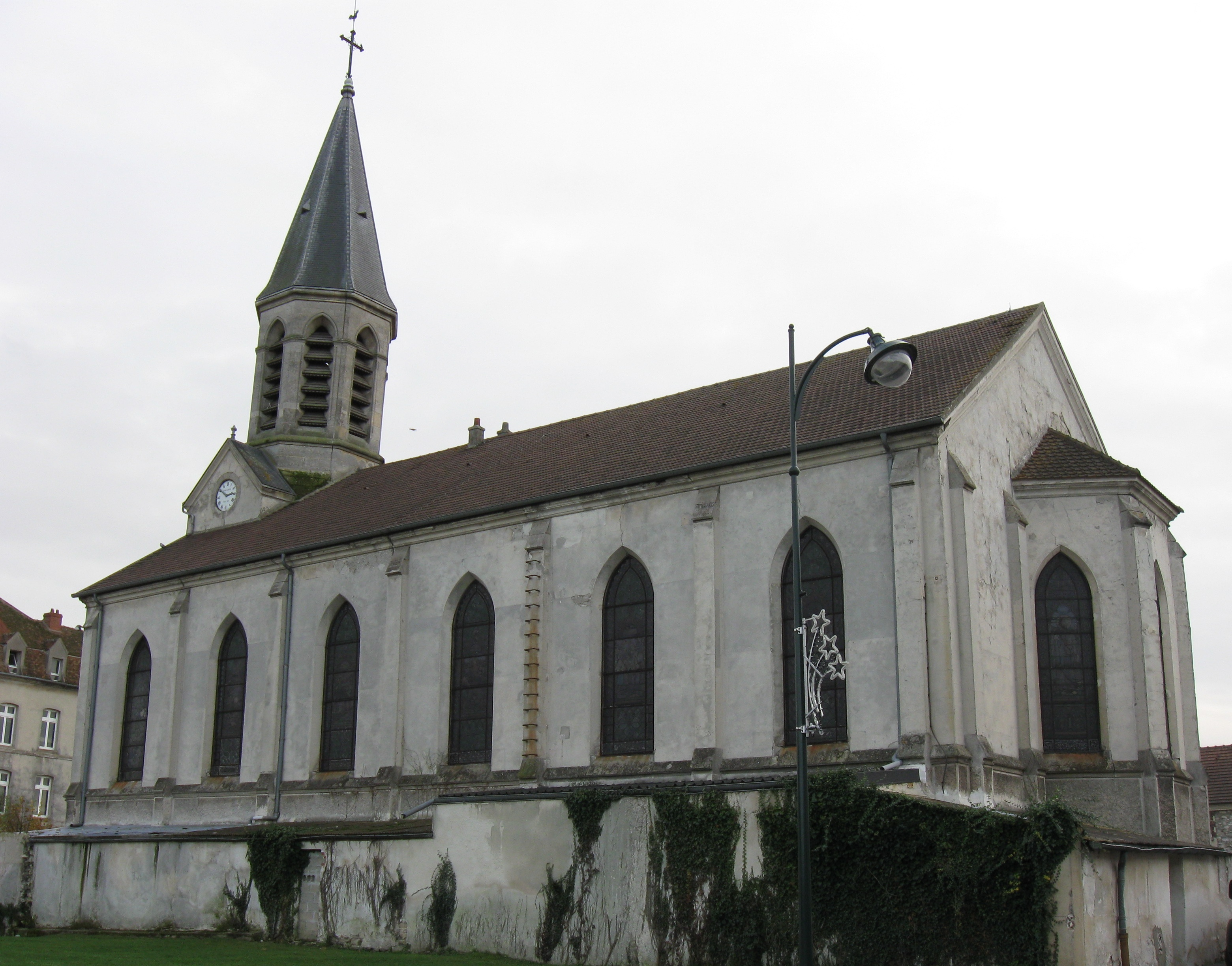 Église Saint-Étienne de Juilly. (Seine-et-Marne, région Île-de-France).